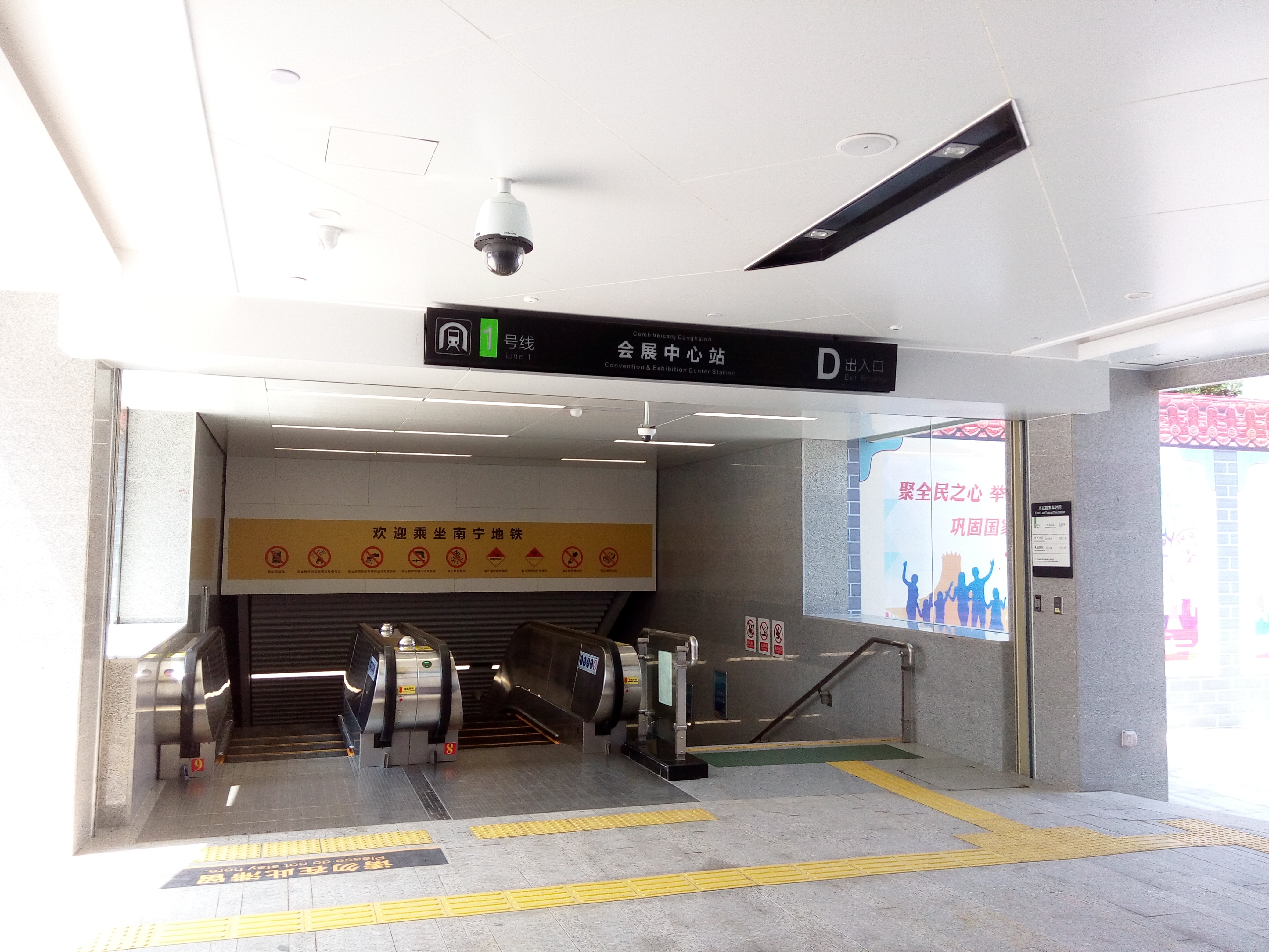 中文（中国大陆）: 南宁轨道交通